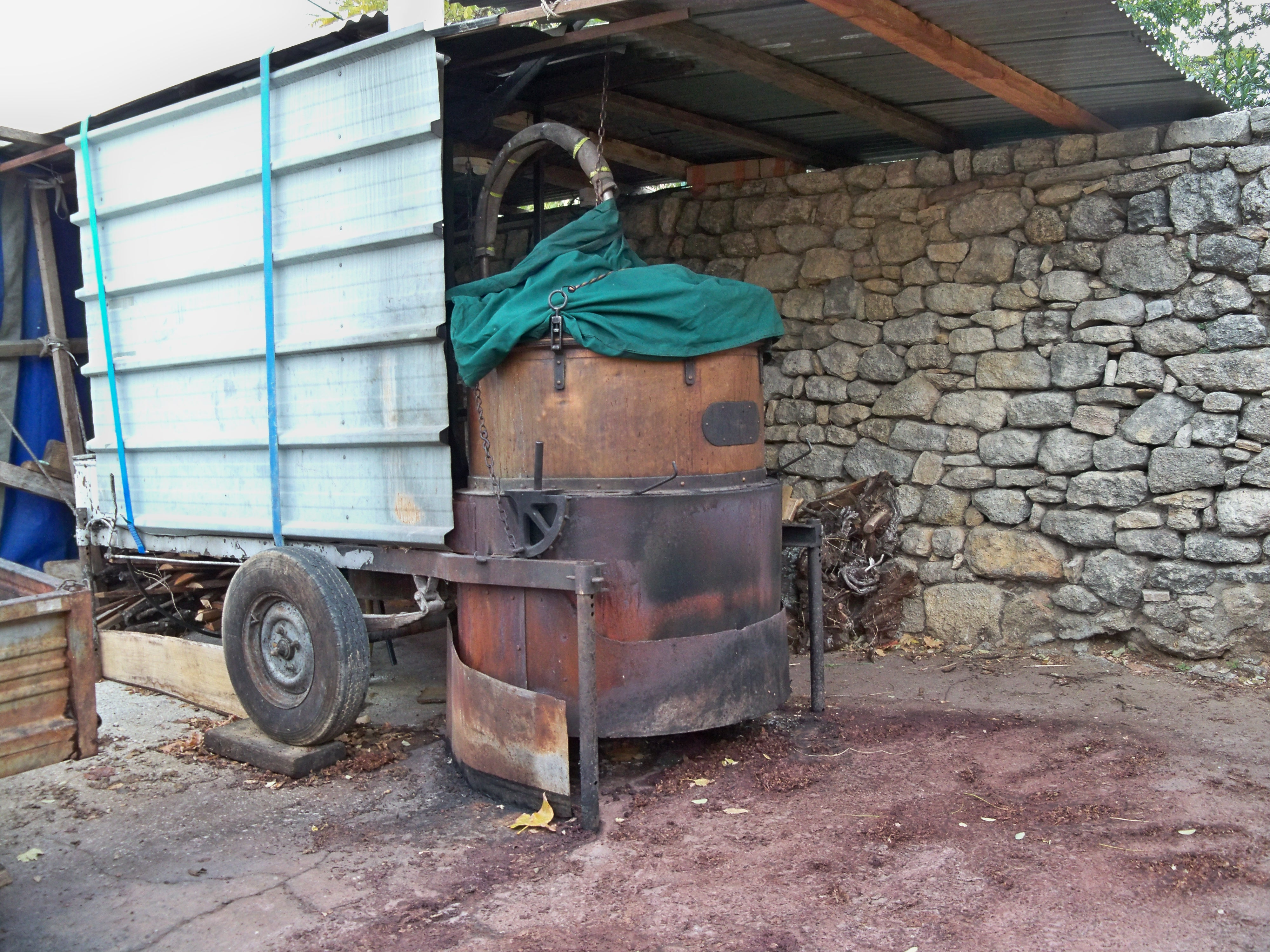 Alambic ambulant à Viens, Vaucluse, France